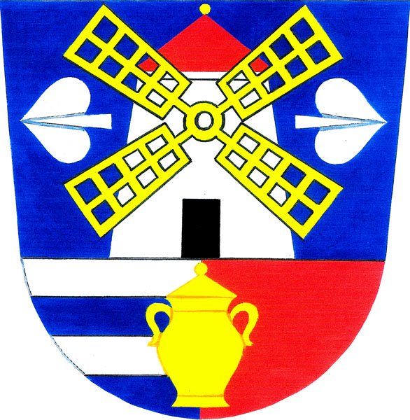 Znak obce Sulíkov